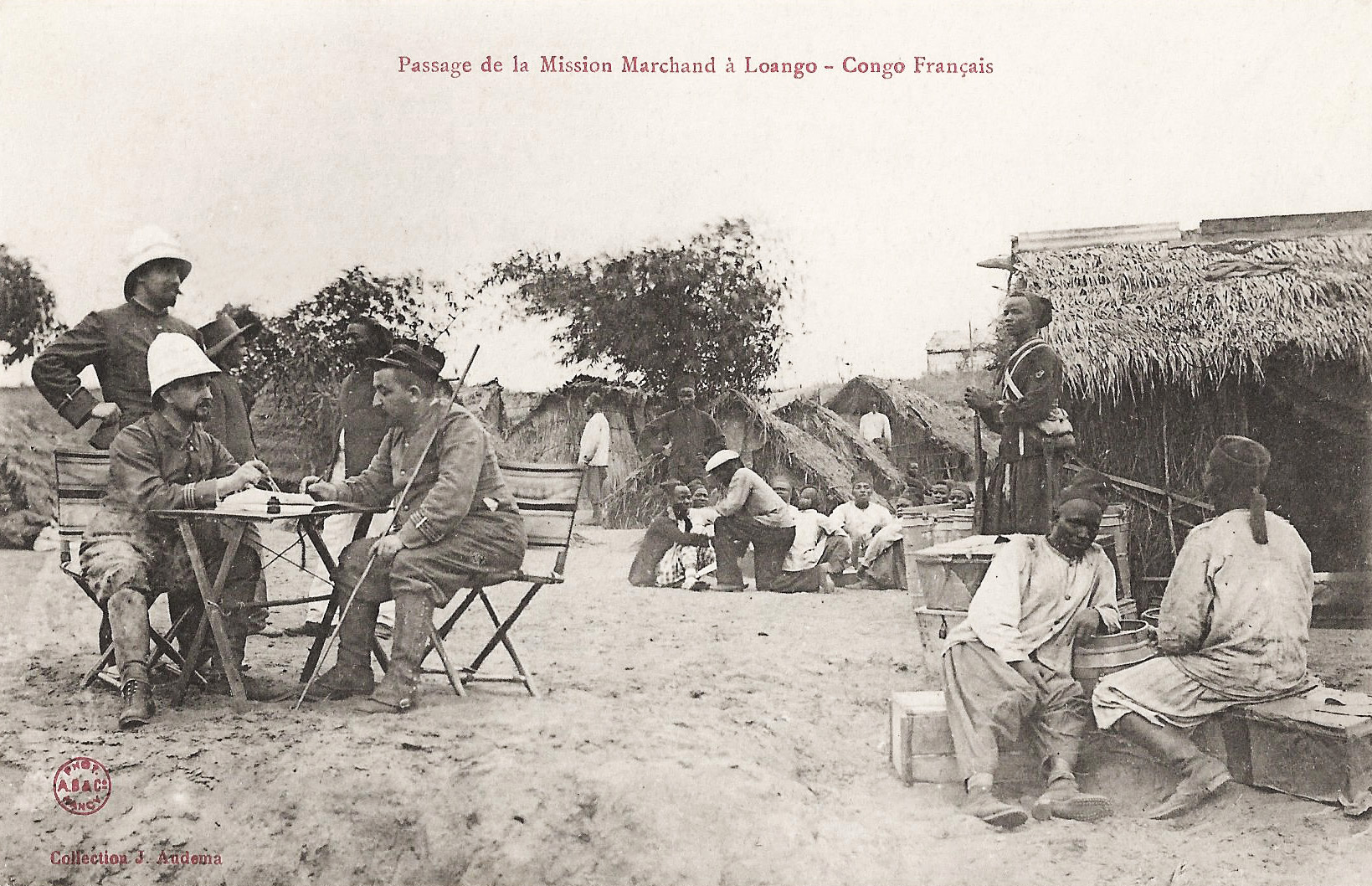 Passage de la Mission Marchand à Loango.. Collection J. Audema. Phot. A.B. & Cie, Nancy [Albert Bergeret] Congo Français